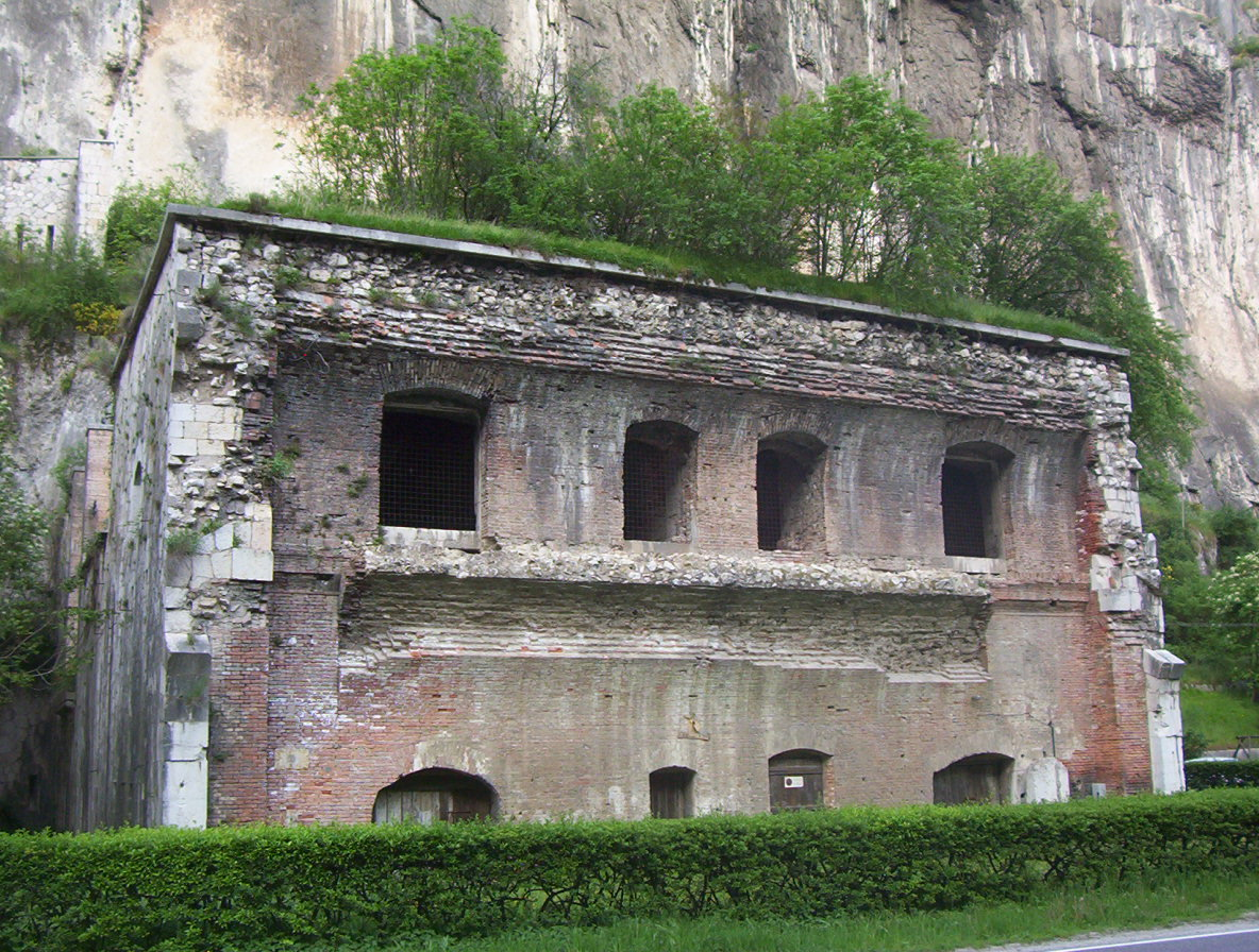 Forte della Chiusa (Ceraino, Dolcè)